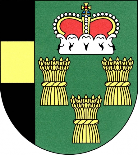 znak, Číčenice, okres Strakonice